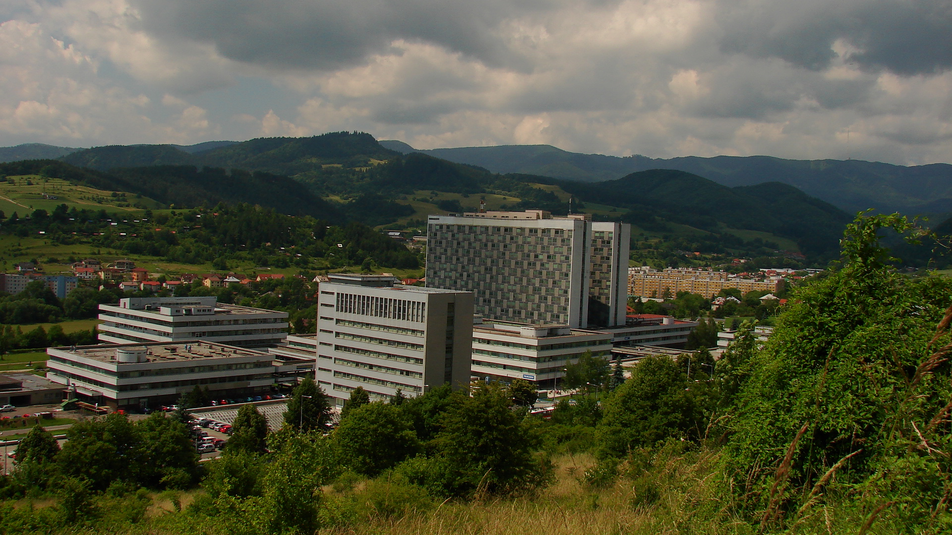 Roosveltova Nemocnica